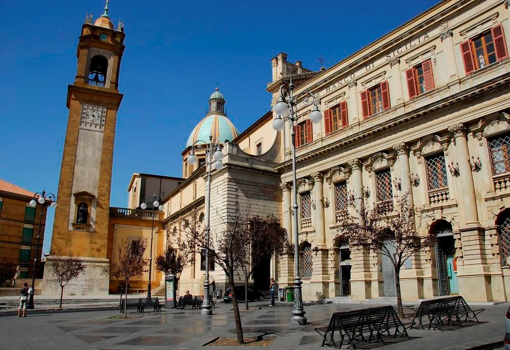 Caltagirone, ITA